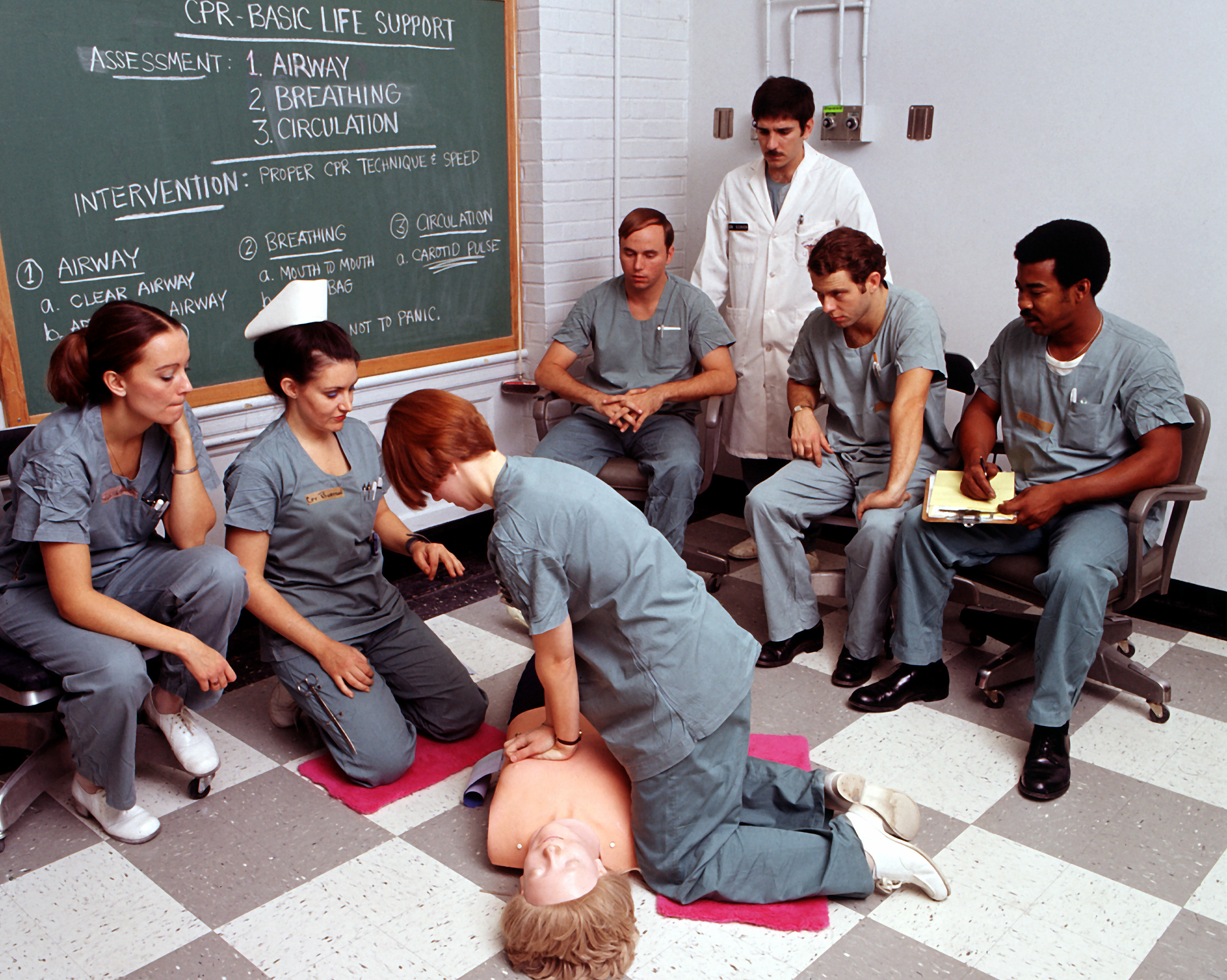 Army medical personnel undergo cardio-pulmonary resuscitation training.